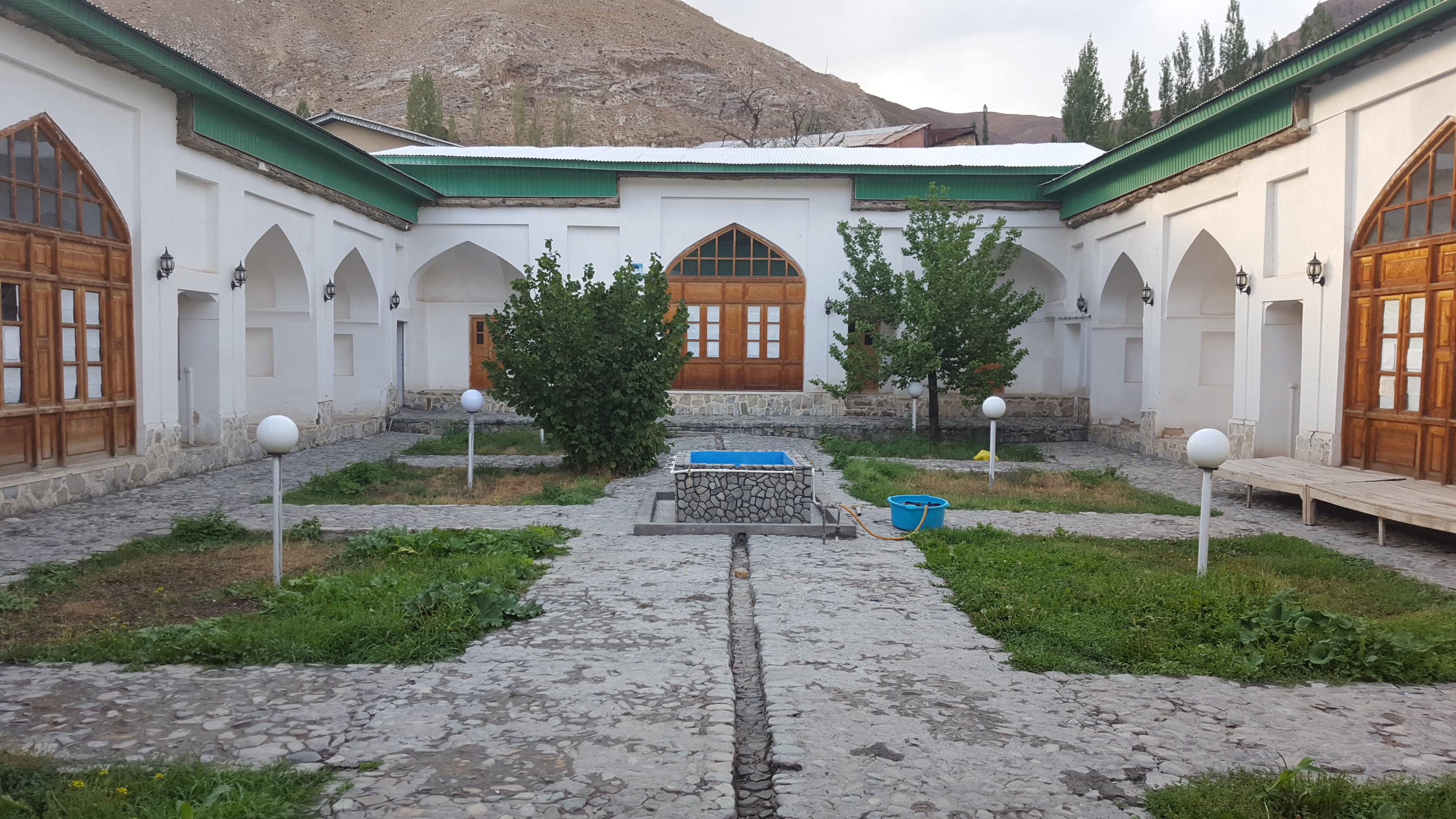 حوزه علمیه